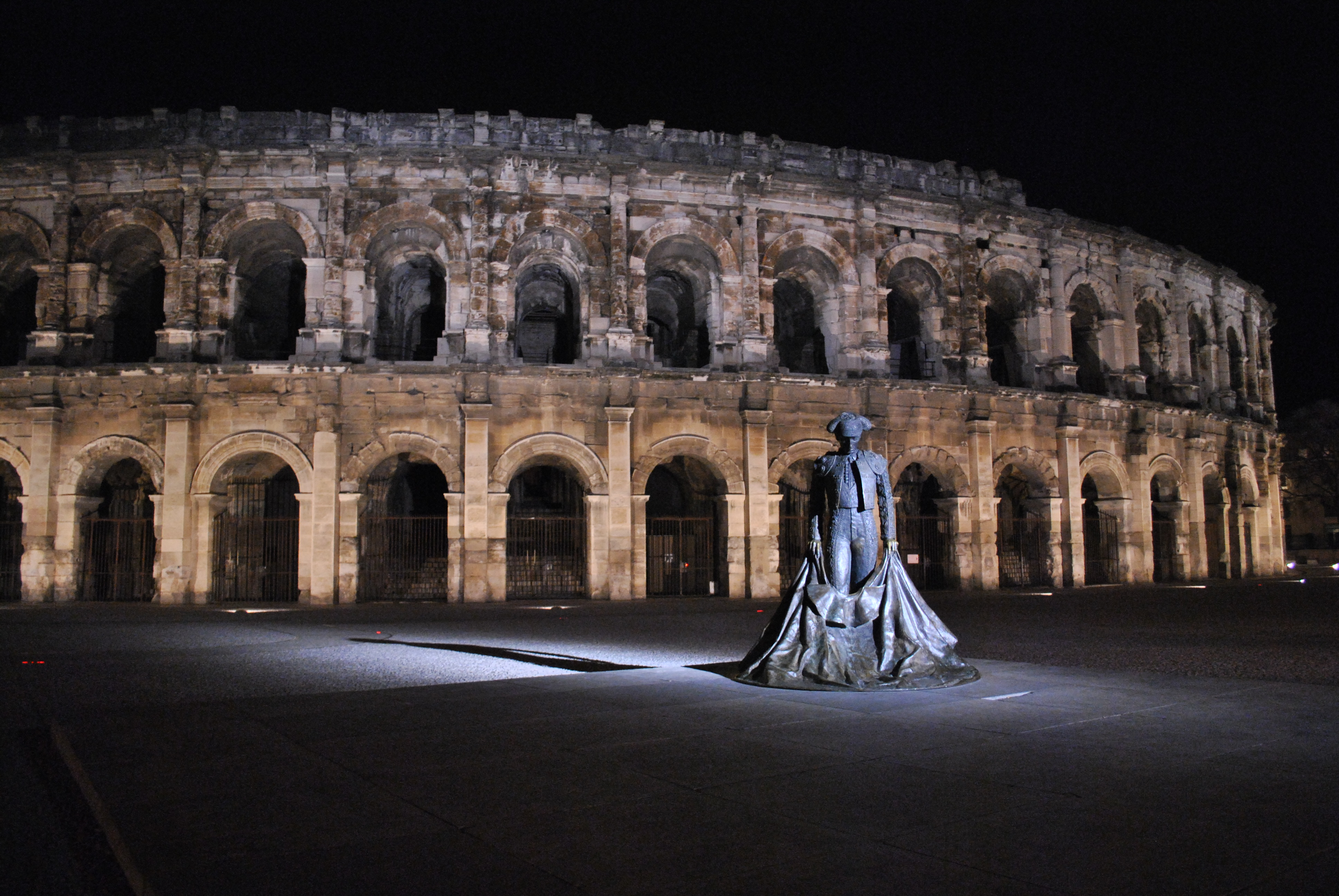 Vue des Arènes de Nîmes de nuit, avec la statue du matador Nimeño II. Photo non retouchée.